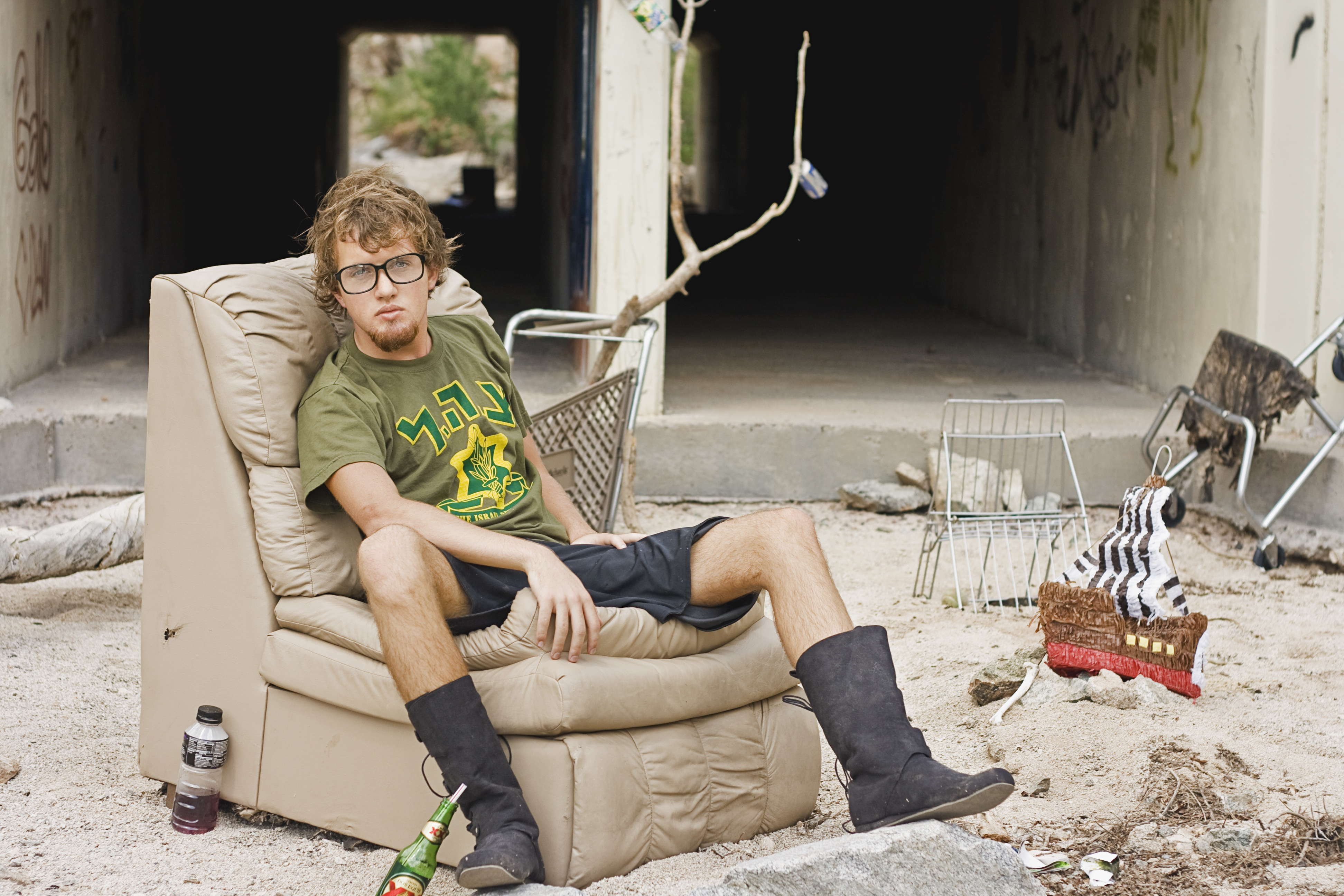 Arbeitslosigkeit kann zu Obdachlosigkeit führen.